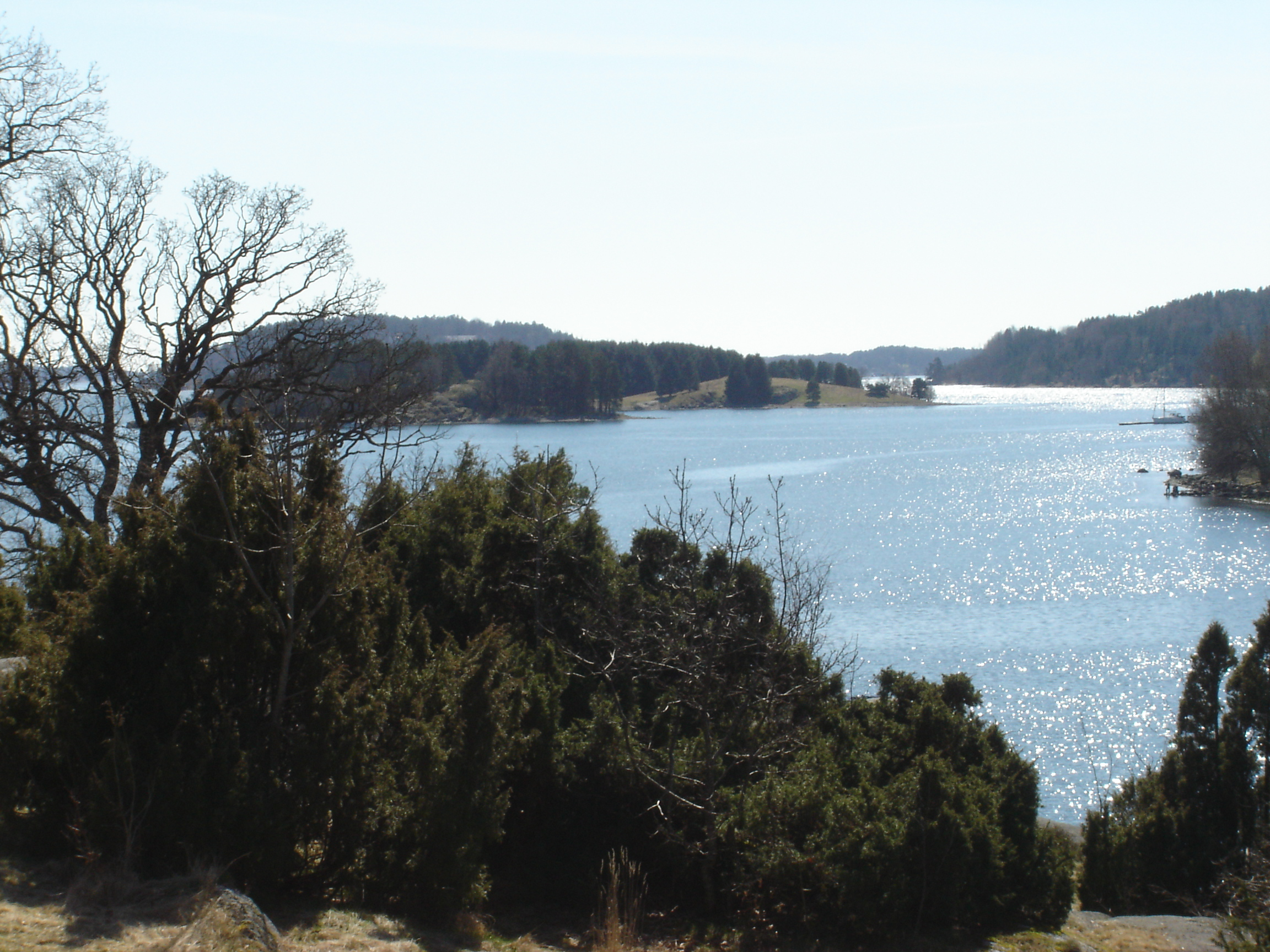 Melsomvik,Norway